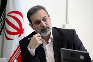 بطحایی